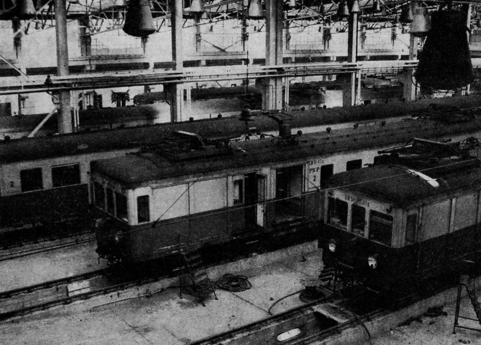 Elektryczne zespoły trakcyjne serii EW51 na terenie lokomotywowni Warszawa Grochów. Lokomotywownię rozpoczęto odbudowywać po wojnie w 1945, natomiast zdjęcie opublikowano w książce z 1974. Fotografia pochodzi zatem z okresu pomiędzy tymi datami.